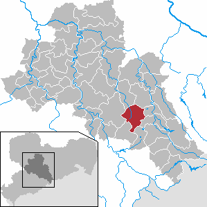 Brand-Erbisdorf in Saxony - district Mittelsachsen